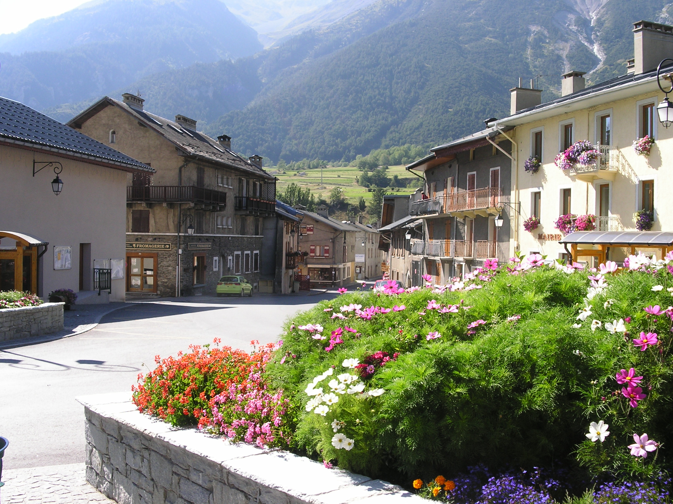 Termignon